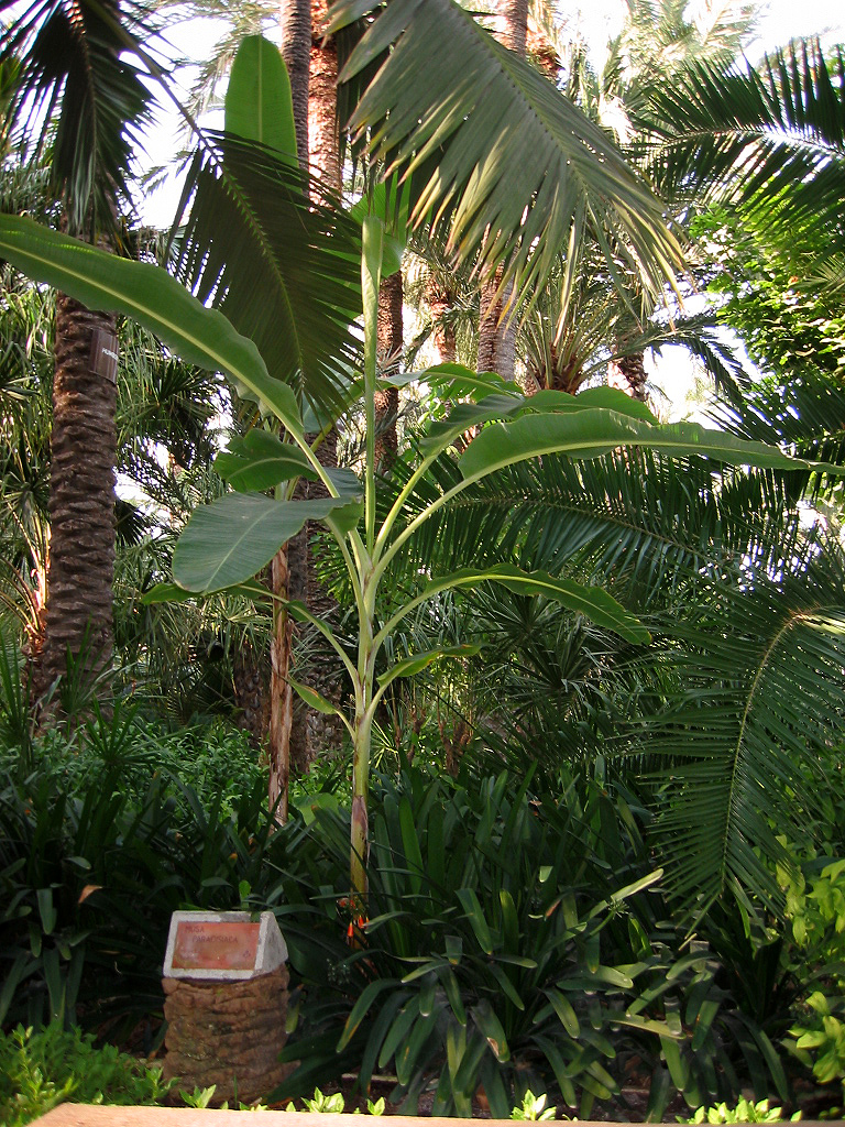 Musa ×paradisiaca en el Huerto del Cura